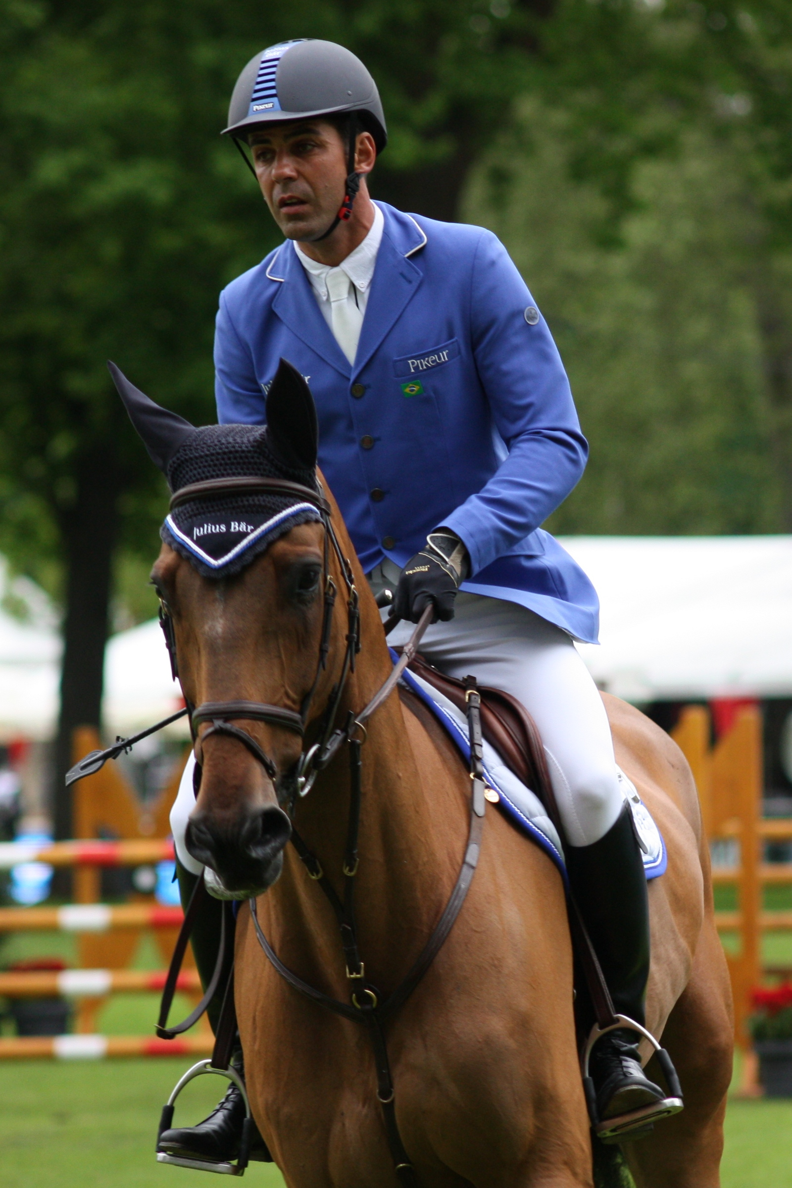 77. Internationanles Wiesbadener Pfingstunier 2013, CSI***** Eröffnungsspringen, Alvaro Alfonso de Neto Miranda auf AD Rahmannshofs Bogeno Personality rights warning Although this work is freely licensed or in the public domain, the person(s) shown may have rights that legally restrict certain re-uses unless those depicted consent to such uses. In these cases, a model release or other evidence of consent could protect you from infringement claims.